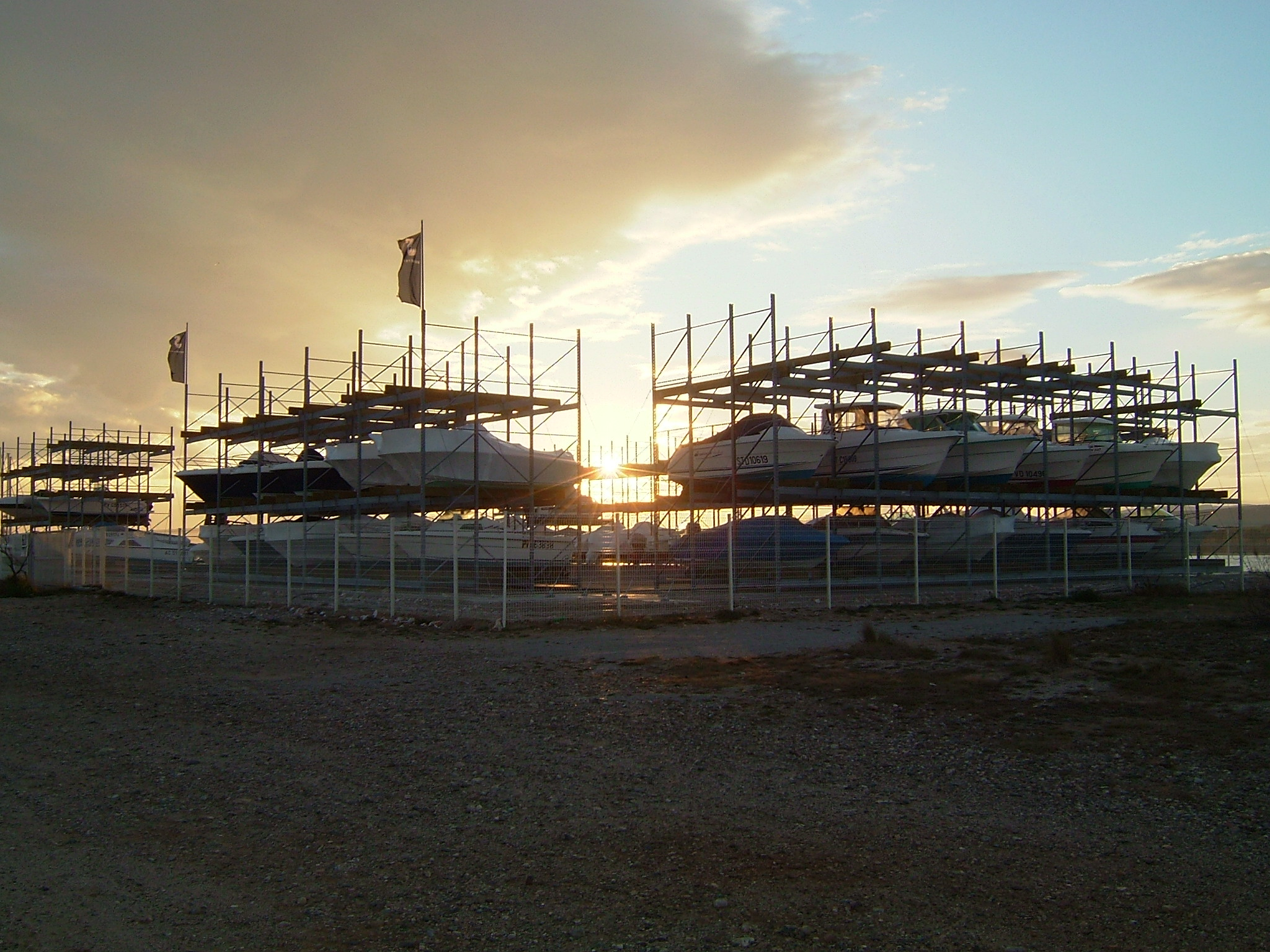 Port à Sec de Port Adhoc Port Leucate